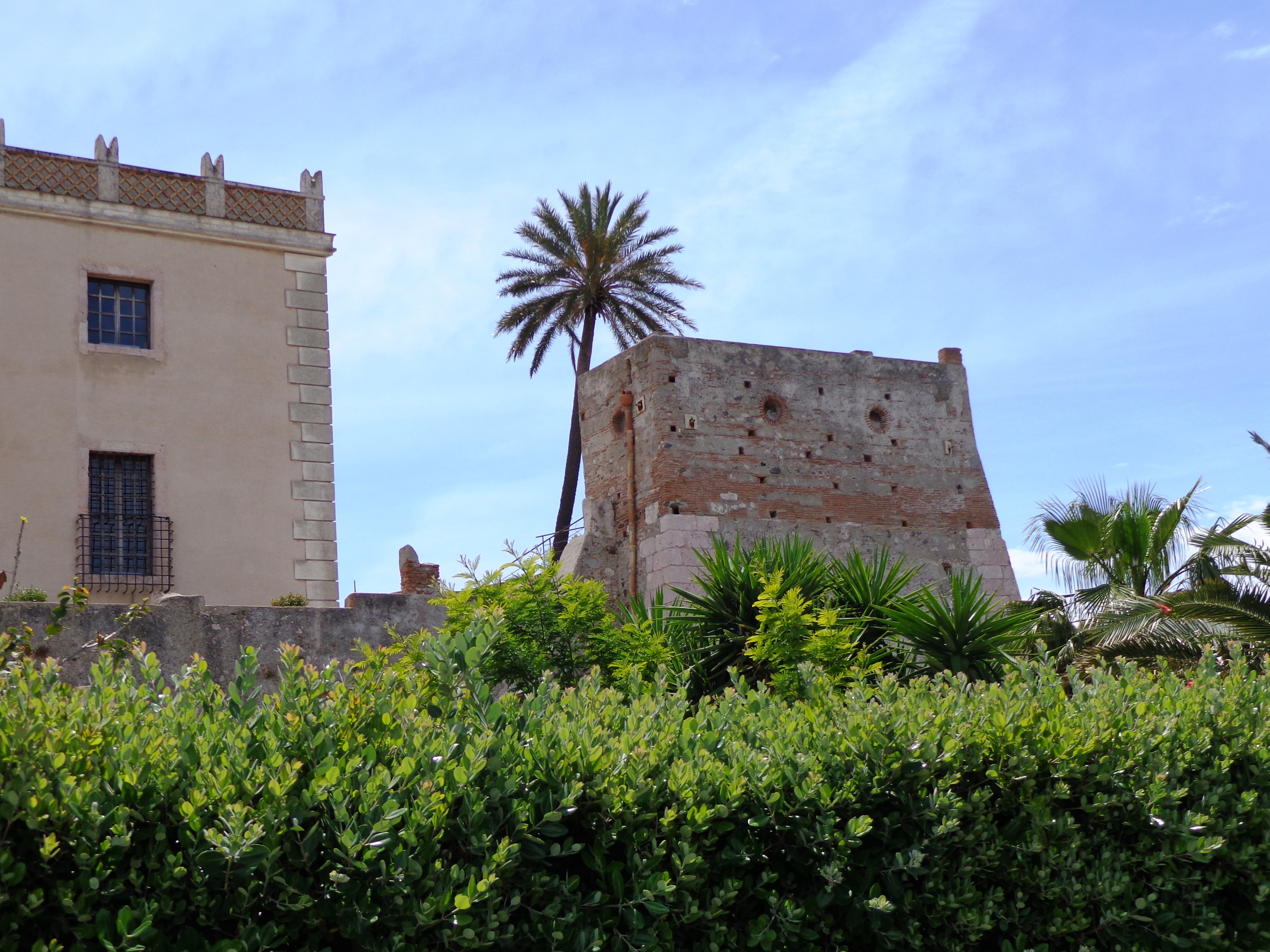 Castello di Bauso This is a photo of a monument which is part of cultural heritage of Italy.